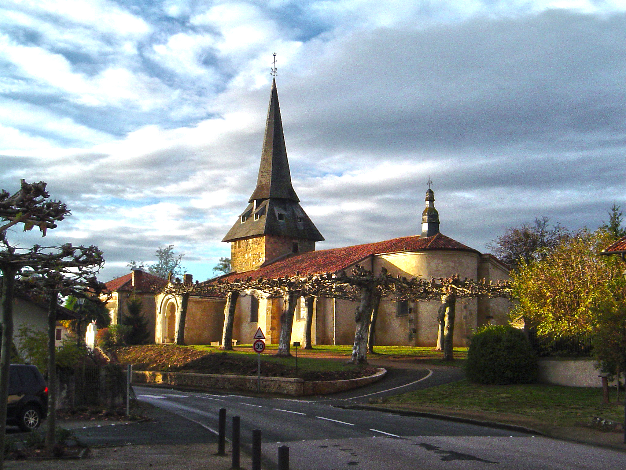 Glèisa de Laureda, Gasconha